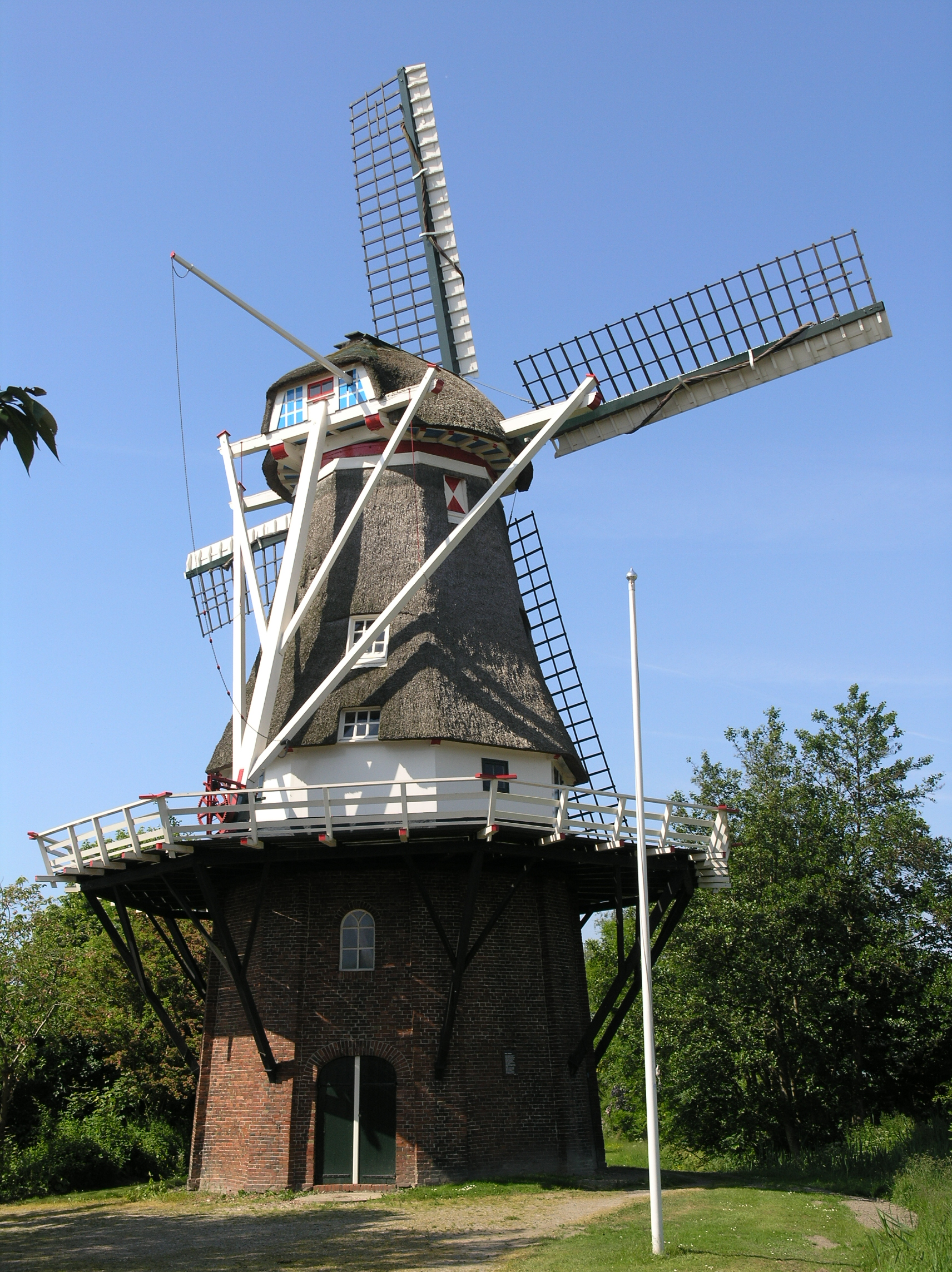 Zandeweer Stellingmolen Windlust